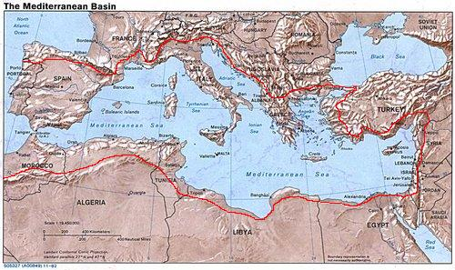 Mittelmeerraum mit rot eingezogener Grenze.